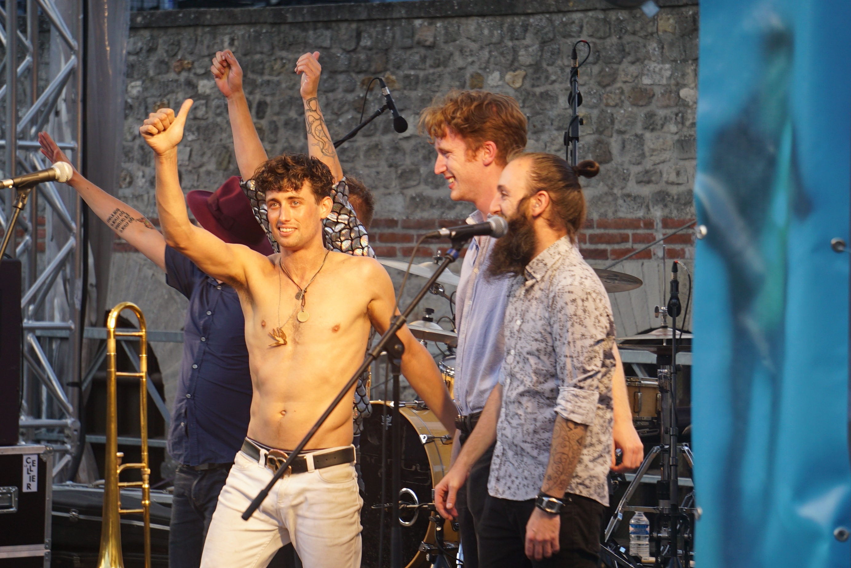 en concert au crptoportique.